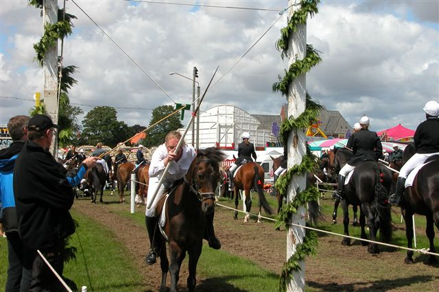 Ringridning i Sønderborg